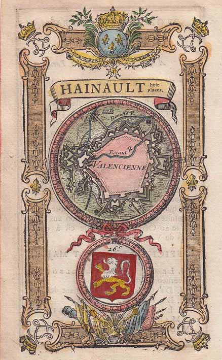 1736 de la Jaisse Map - Valenciennes, France